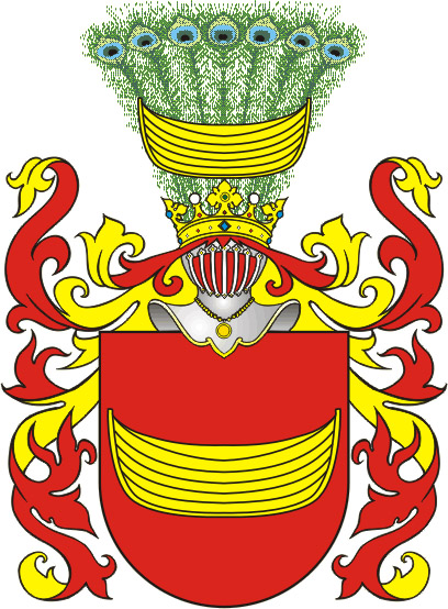 Clan Łodzia